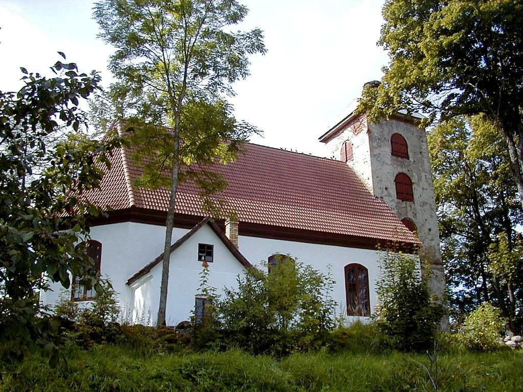 Struteles luterāņu baznīca 2000-09-02